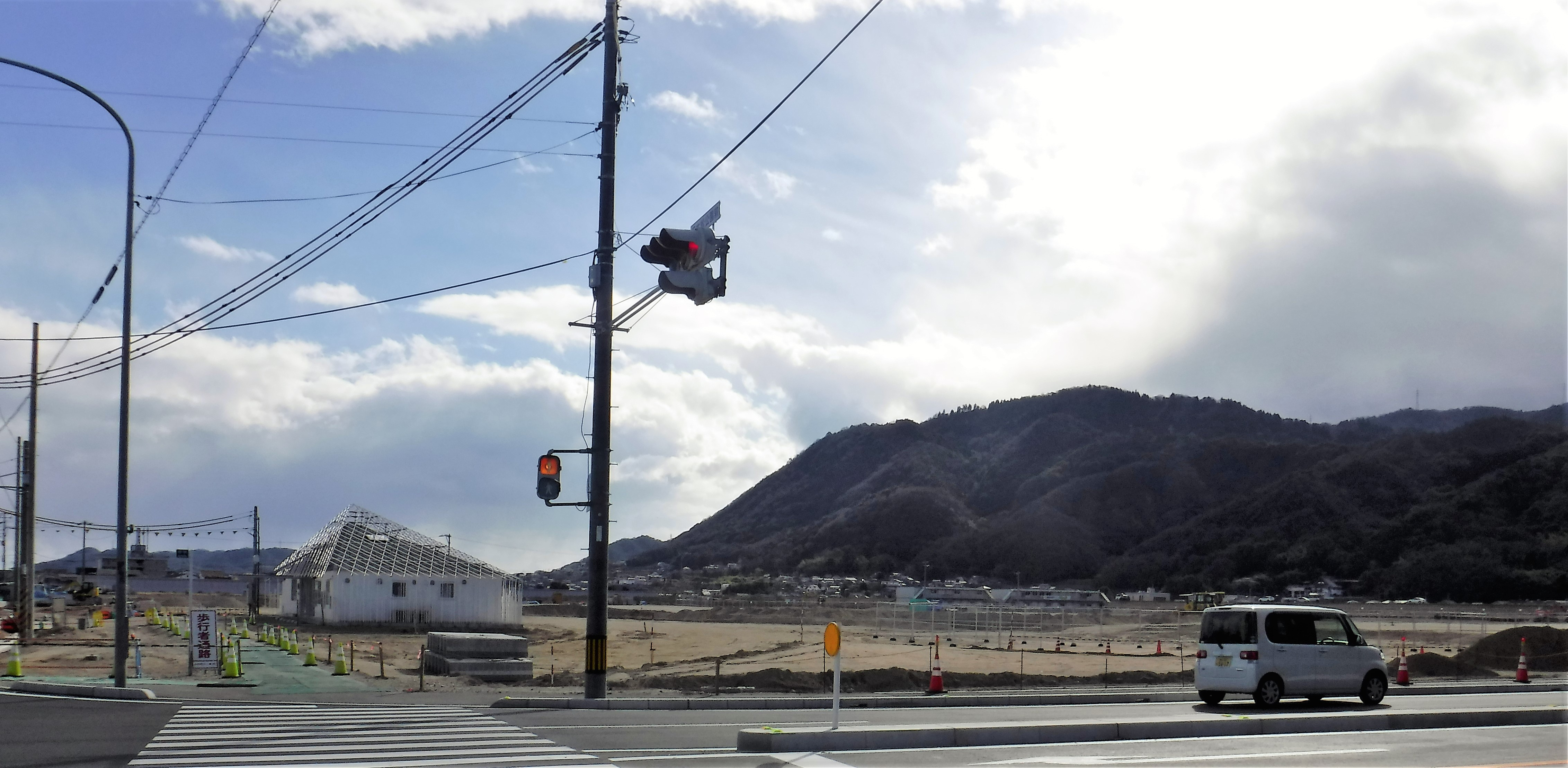 廃止された福山競馬場。更地化が終了。2018年1月。